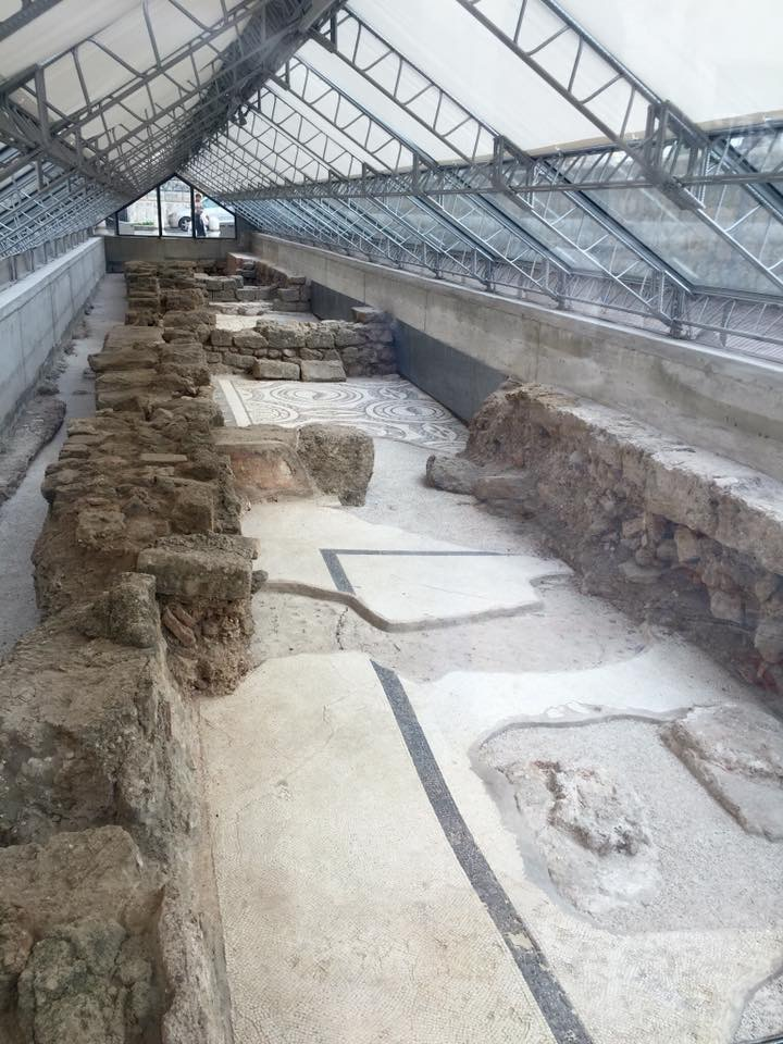 Mosaici pavimentali di case romane in piazza Sett'Angeli a Palermo